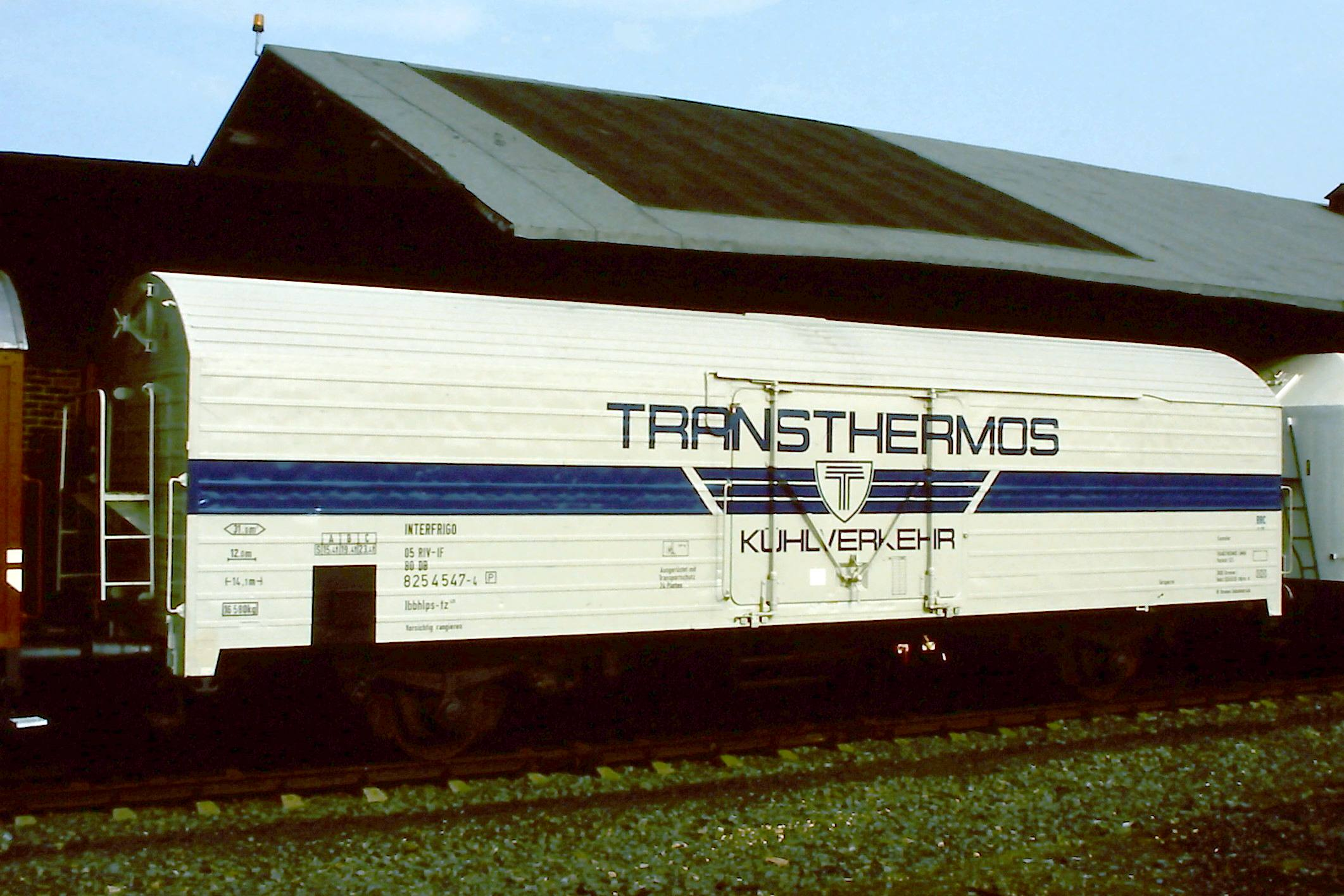 Bei der DB eingestellter Kühlwagen der Gattung Ibbhlps-tz410 von Interfrigo (Transthermos Kühlverkehr), ausgestellt bei der Fahrzeugschau 150 Jahre Eisenbahn in Deutschland in Bochum-Dahlhausen